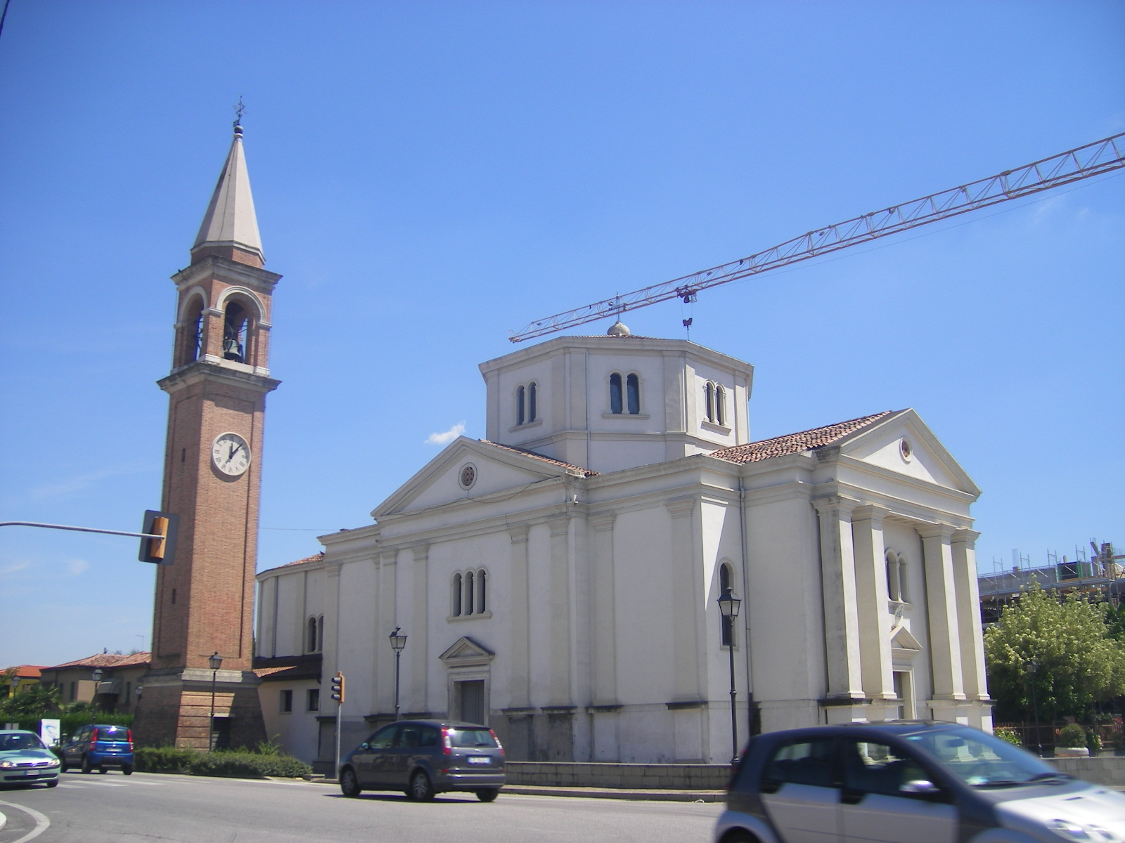 Mellaredo (comune Pianiga)